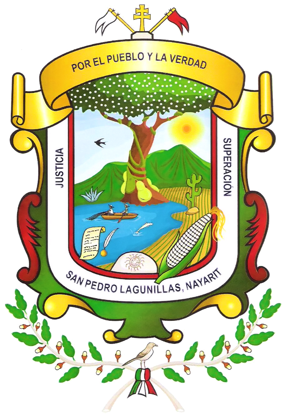 escudo oficial del municipio de San Pedro Lagunillas